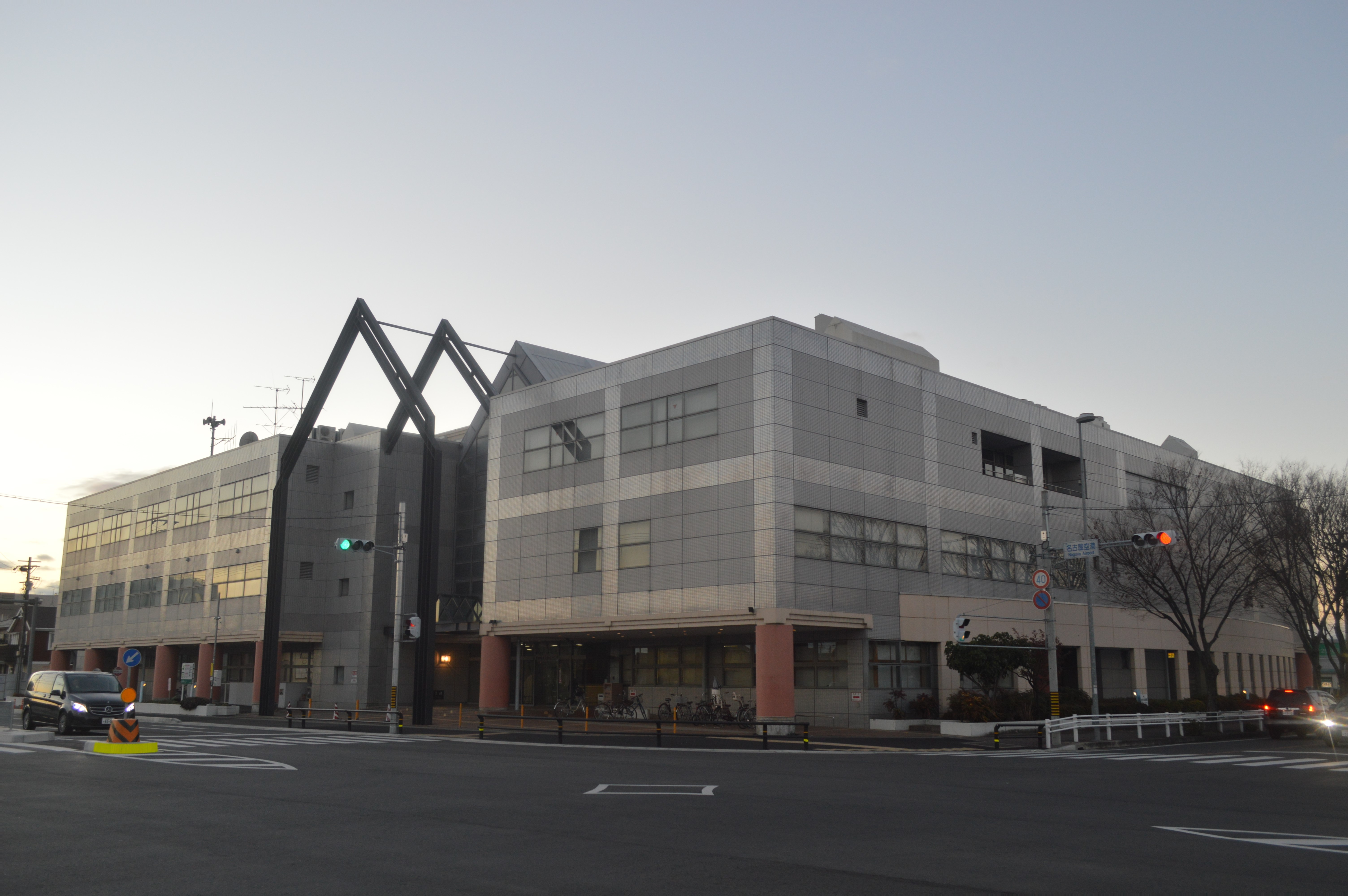 愛知県西春日井郡豊山町にある豊山町社会教育センター。